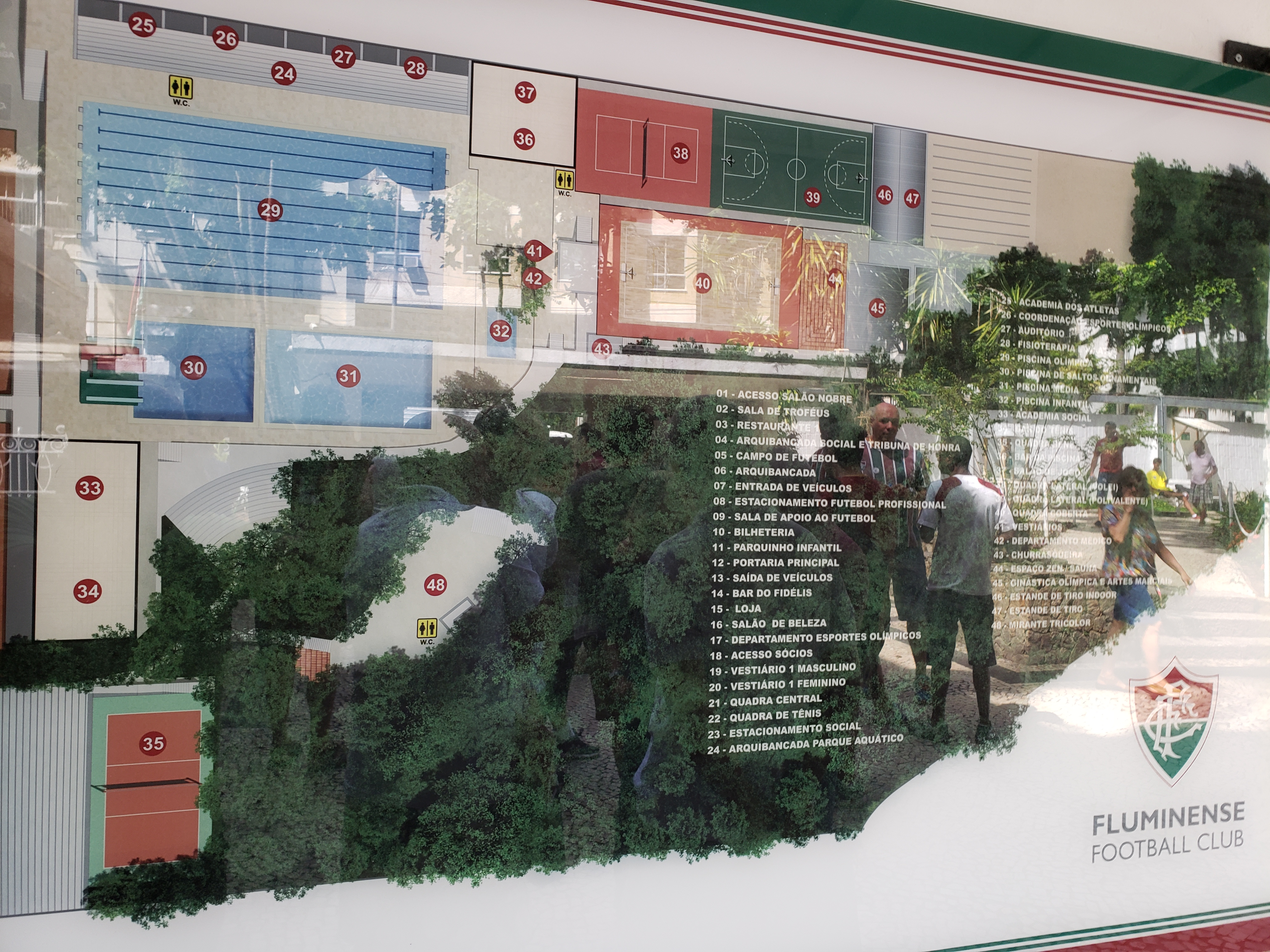 Planta do Fluminense Football Club exposta na sede do clube.